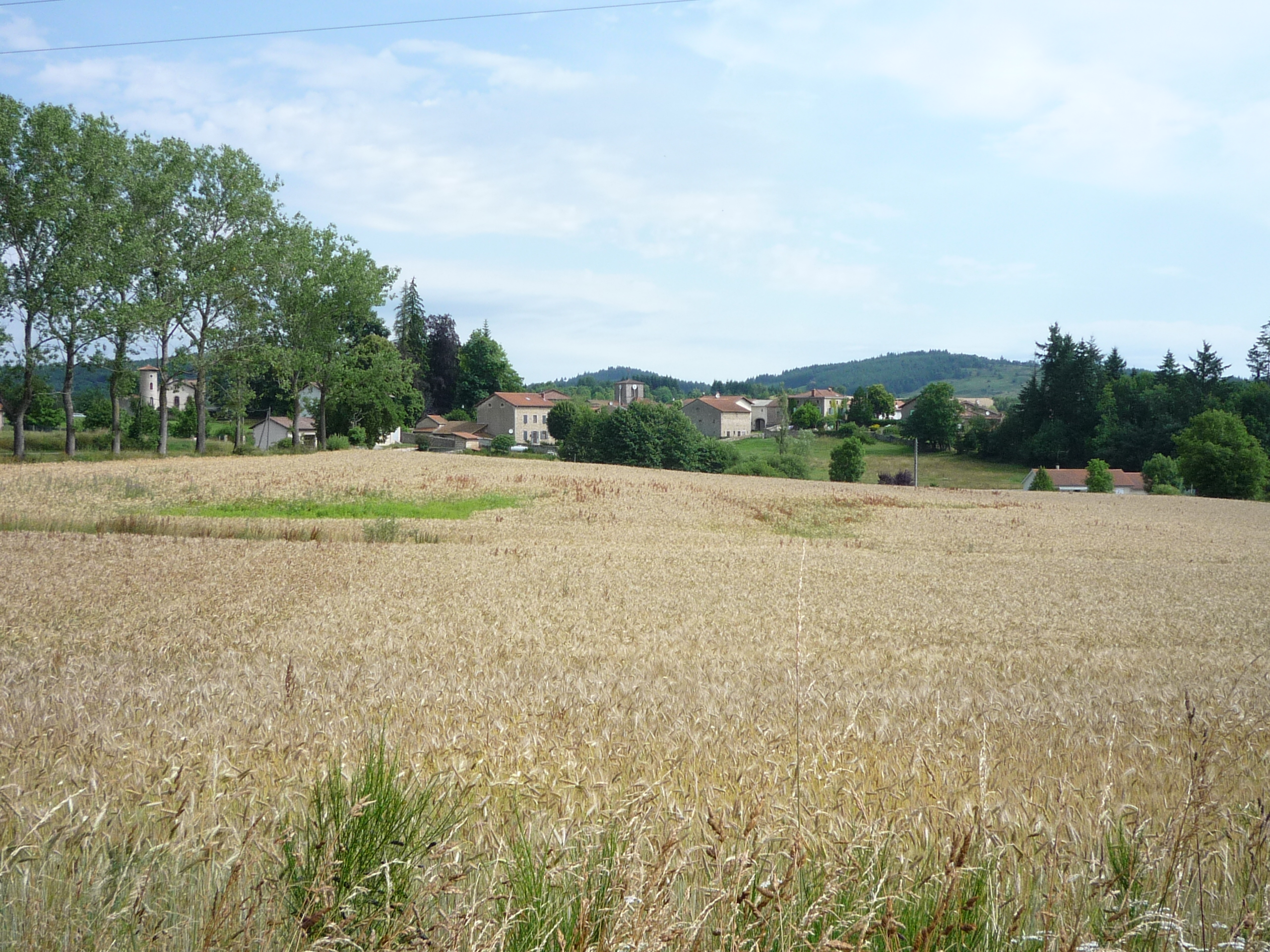 le bourg des salles vu depuis la croix de charbonnières